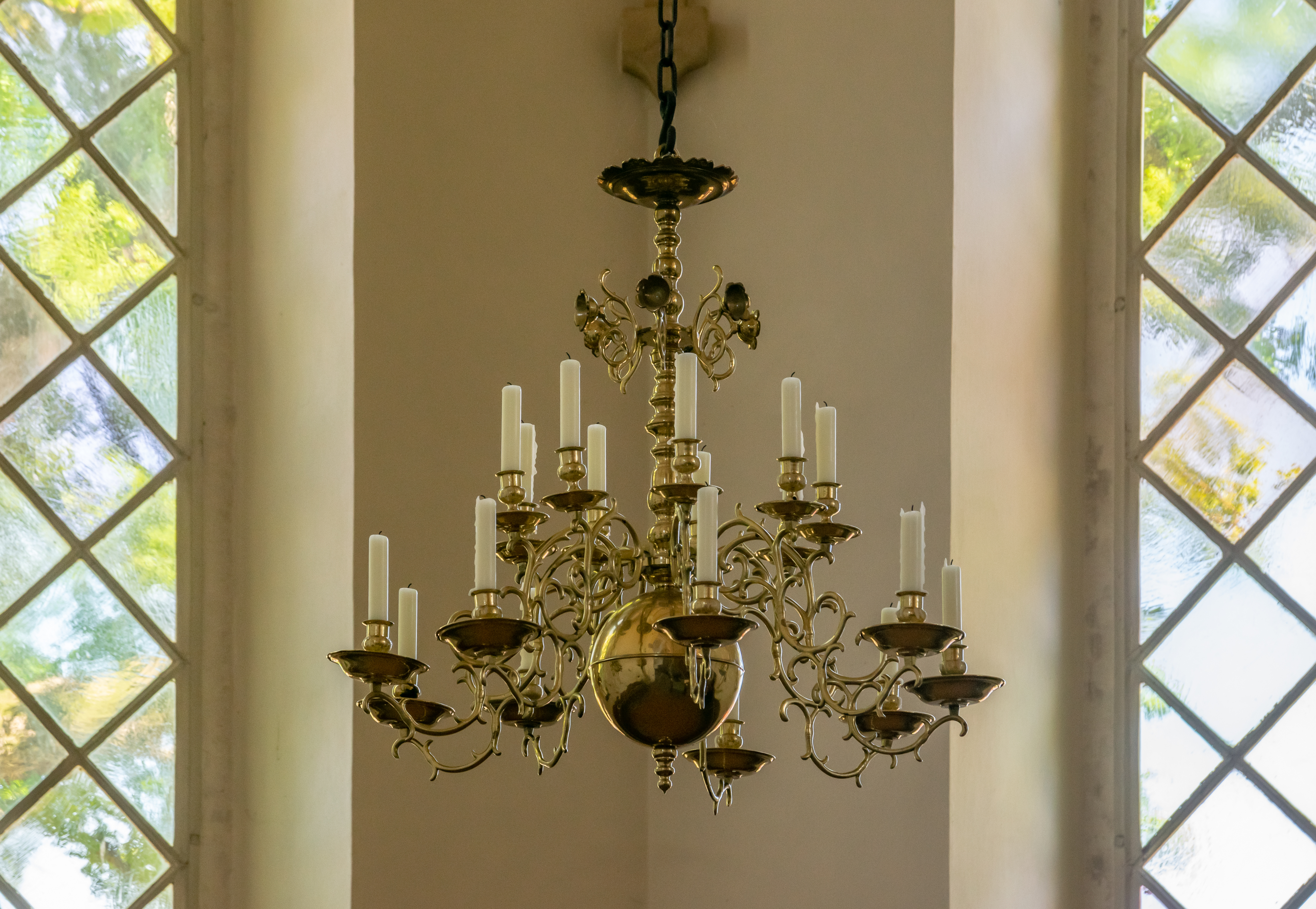 Evangelisch-reformierte Kirche in Dörentrup-Bega; Kronleuchter